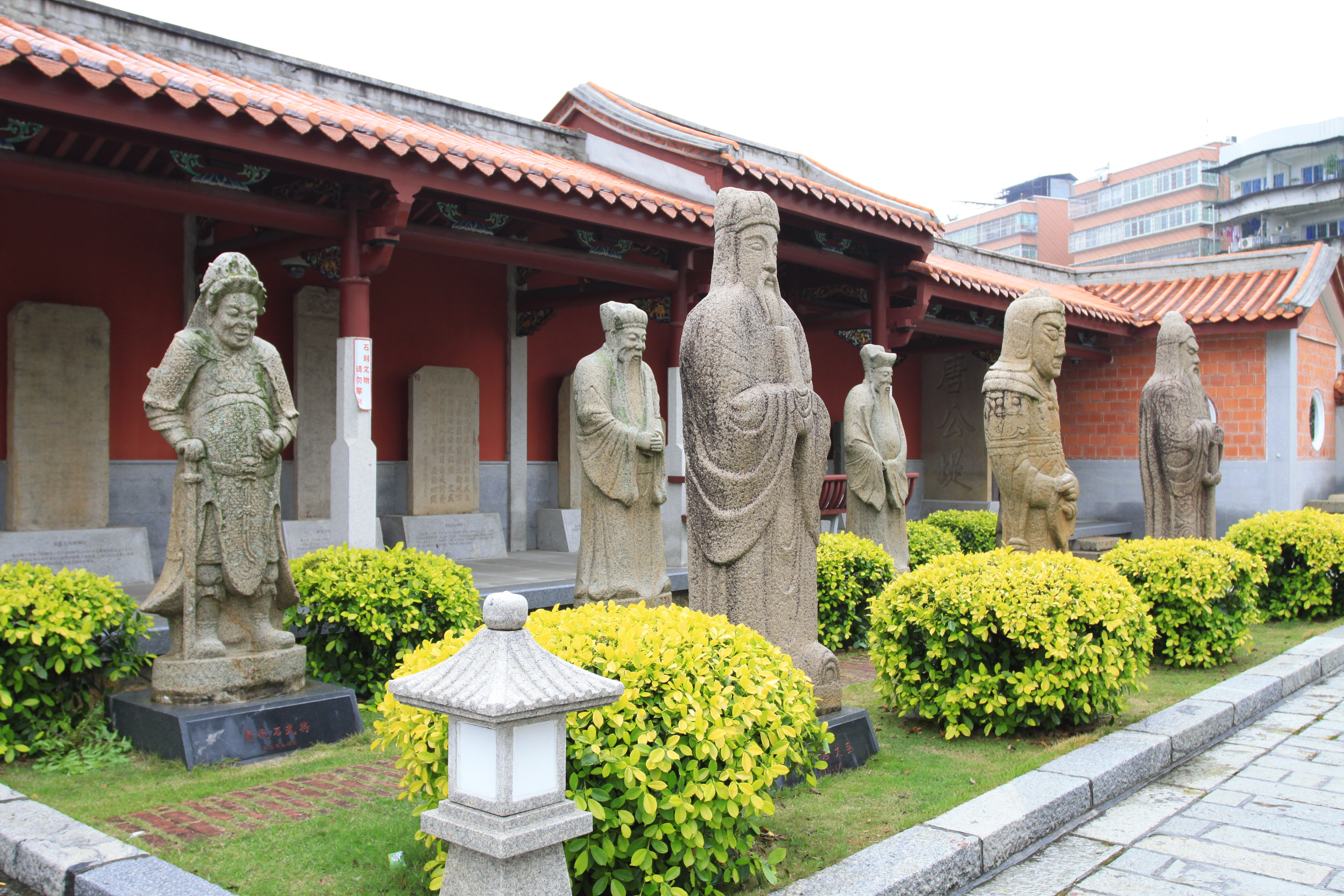 同安孔庙，位于中国福建省厦门市同安区，是福建省文物保护单位。